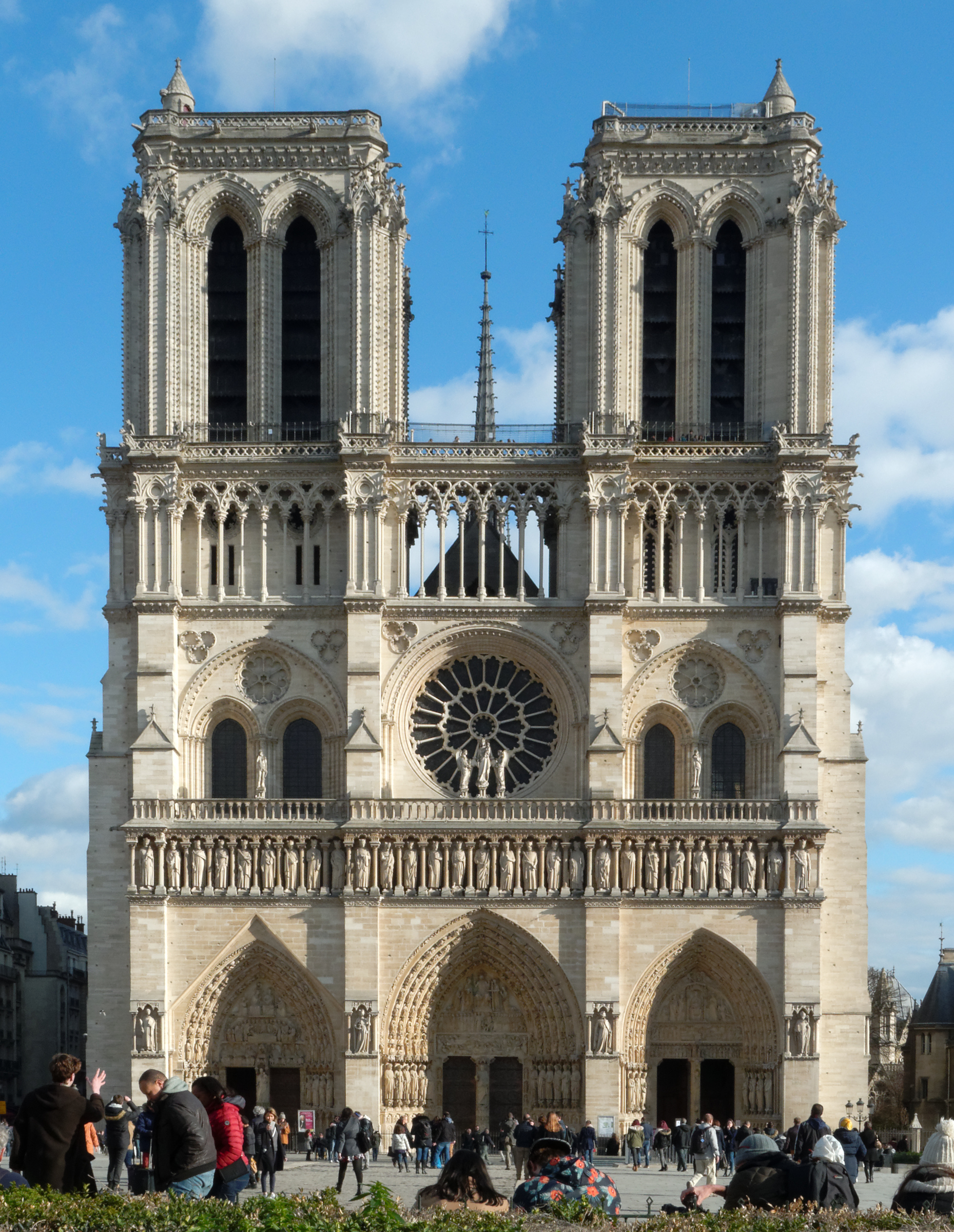 Paris : Cathédrale Notre-Dame de Paris.